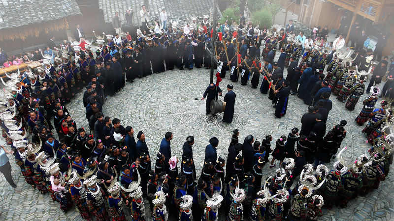 苗寨风情